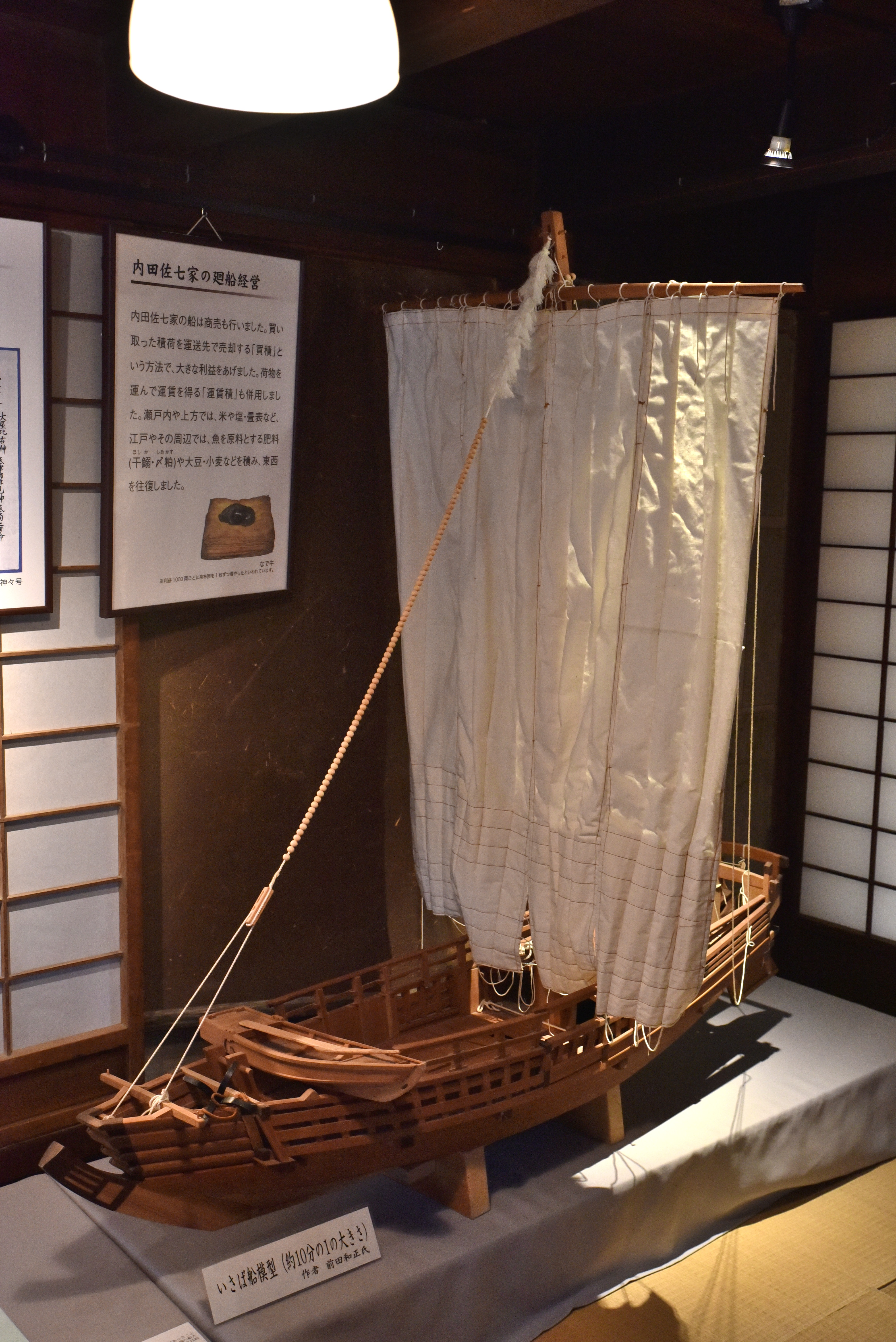 尾州廻船の模型 Nikon D750